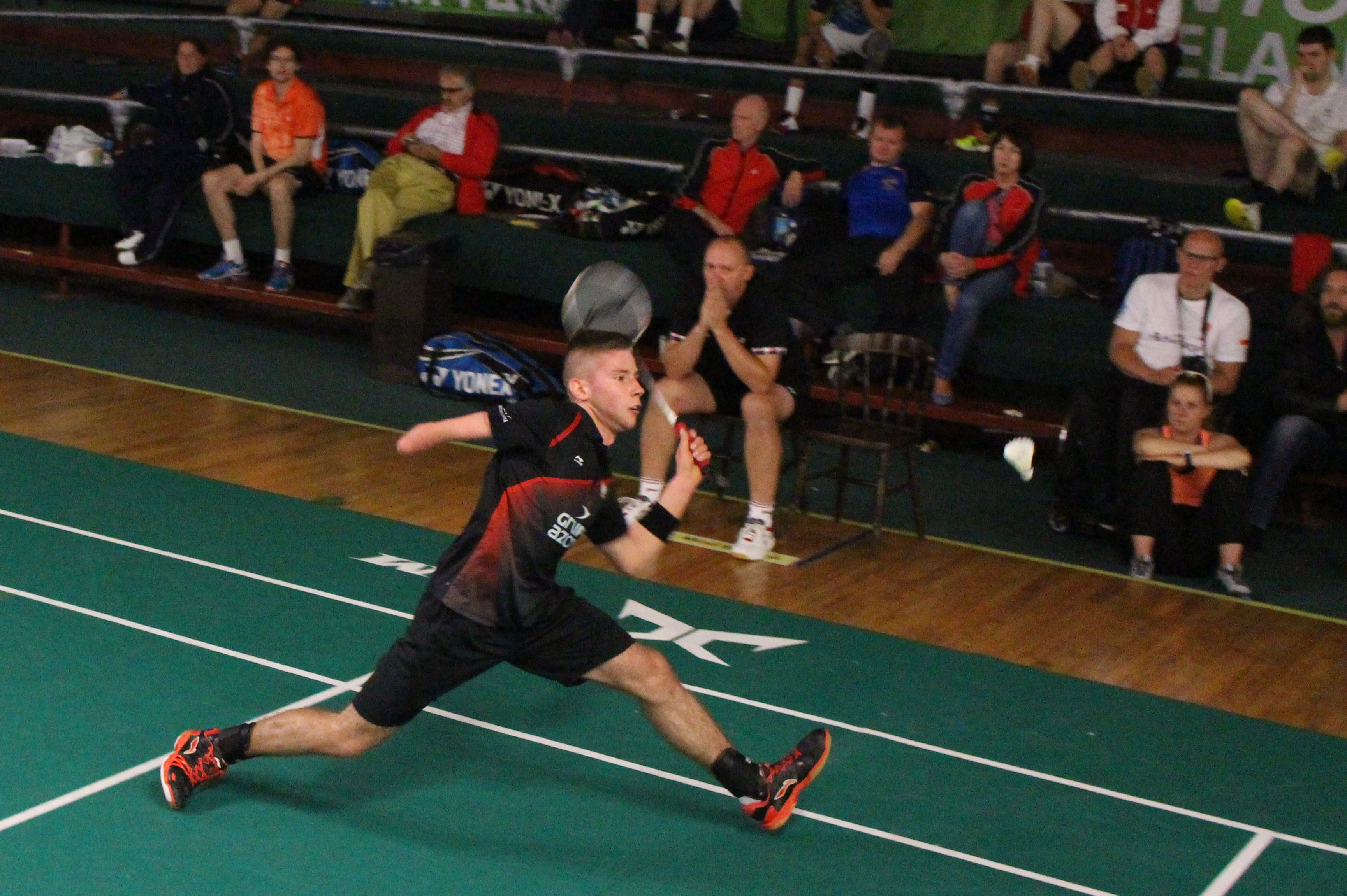 Bartłomiej Mróz - wicemistrz świata w parabadmintonie. Podwójny złoty medalista Irish Para-Badminton International 2015 Dublin